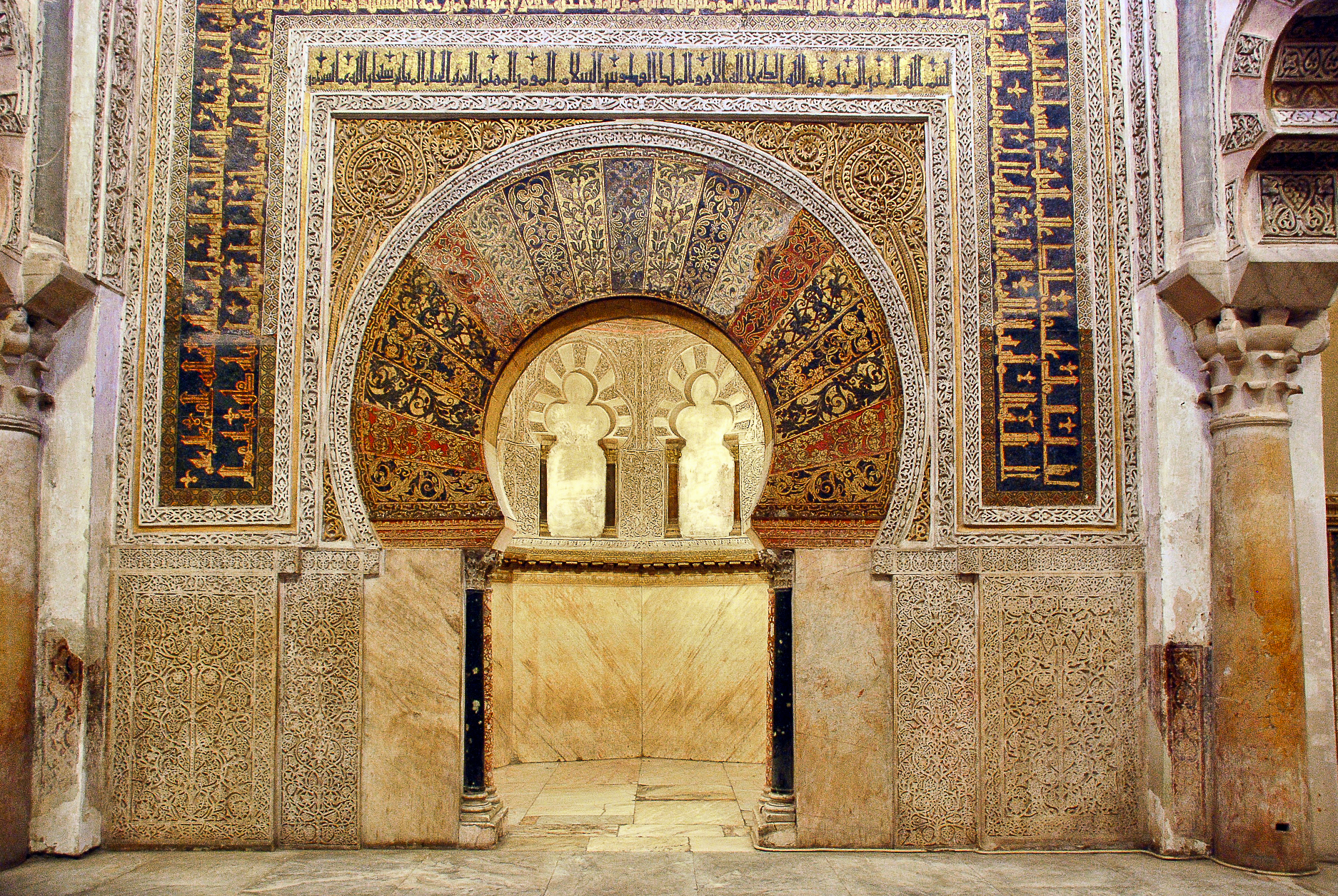 Mihrab de la Mezquita de Córdoba (España).